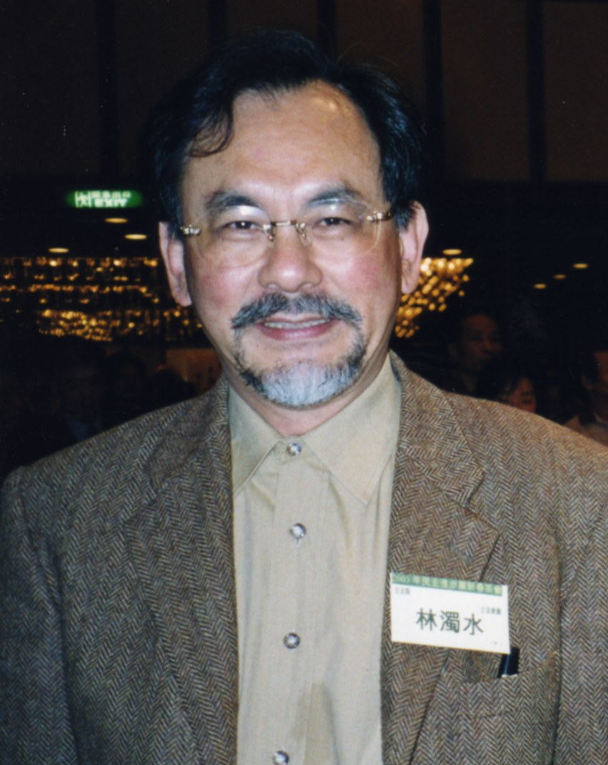 民主進步黨立法委員林濁水出席2003年民主進步黨新春聯誼茶會。